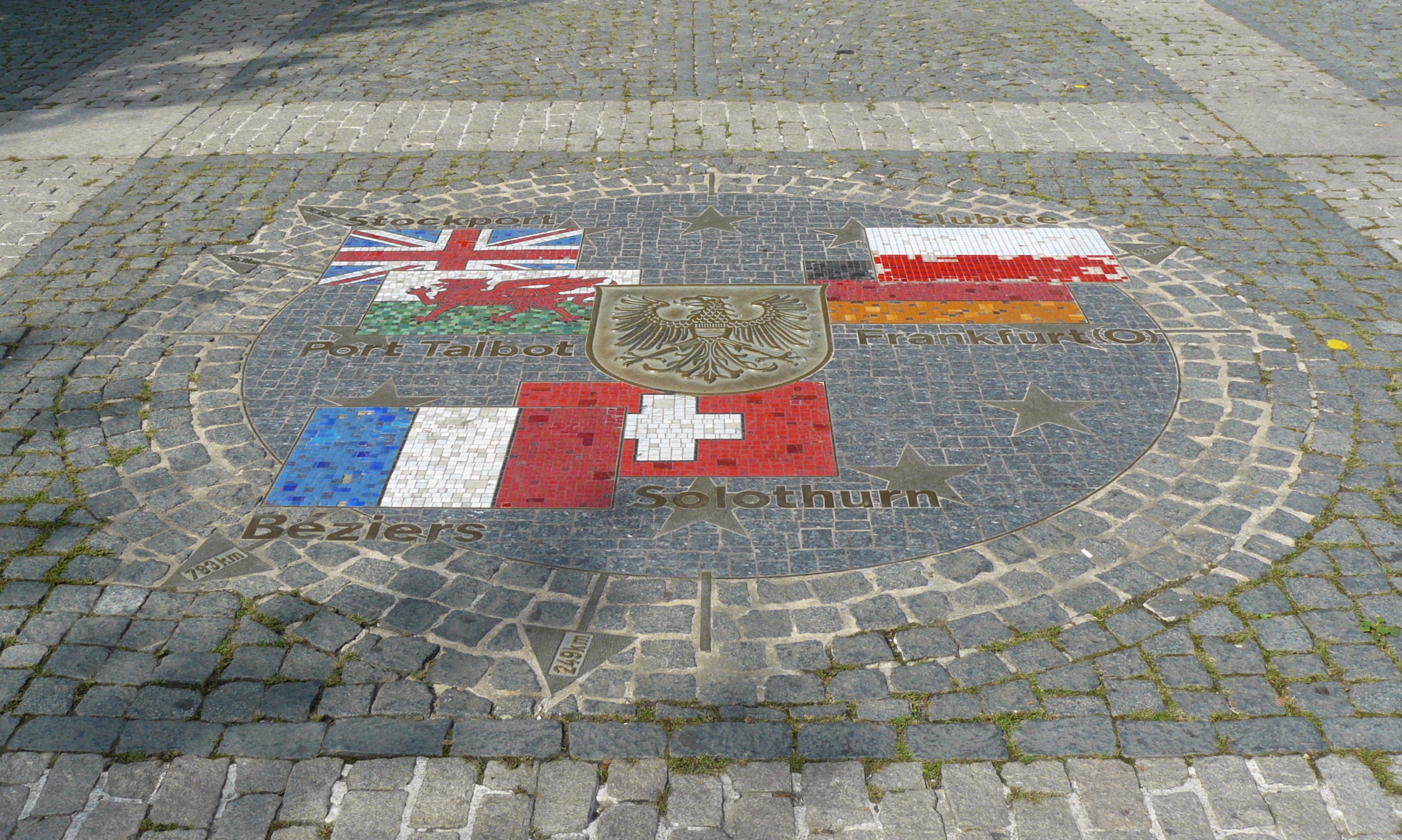 Die Flaggen der Länder, in denen die Partnerstädte von Heilbronn liegen, im Boden vor dem Rathaus